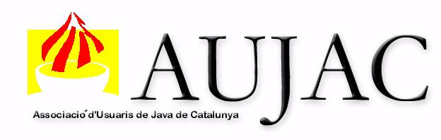 Logo oficial d'Aujac, Associació d'Usuaris de Java de Catalunya.